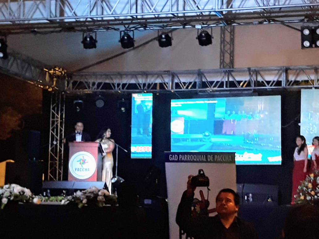 Elección de la Reina de Paccha por sus festividades en Honor a la Virgen de los Dolores en el parque central